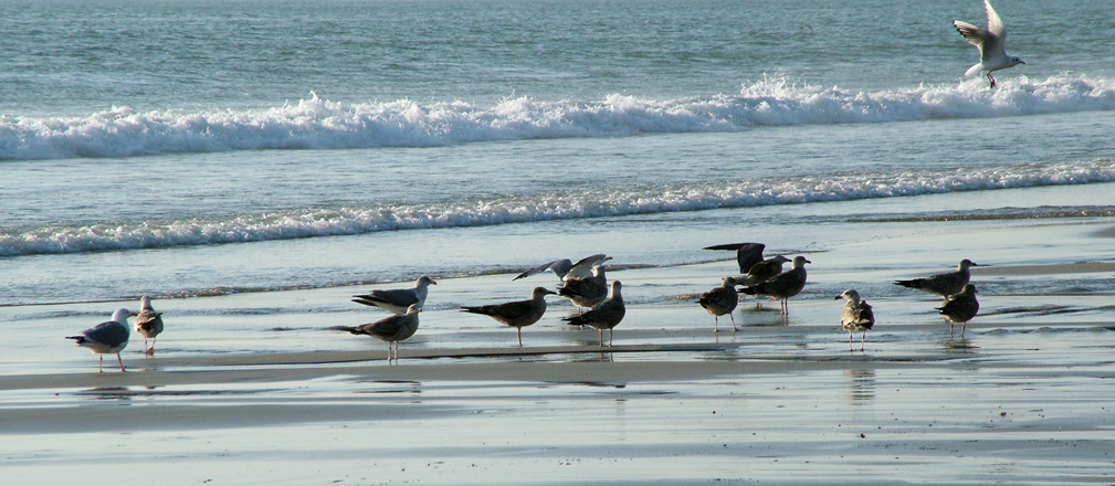 Gaivotas Matosinhos